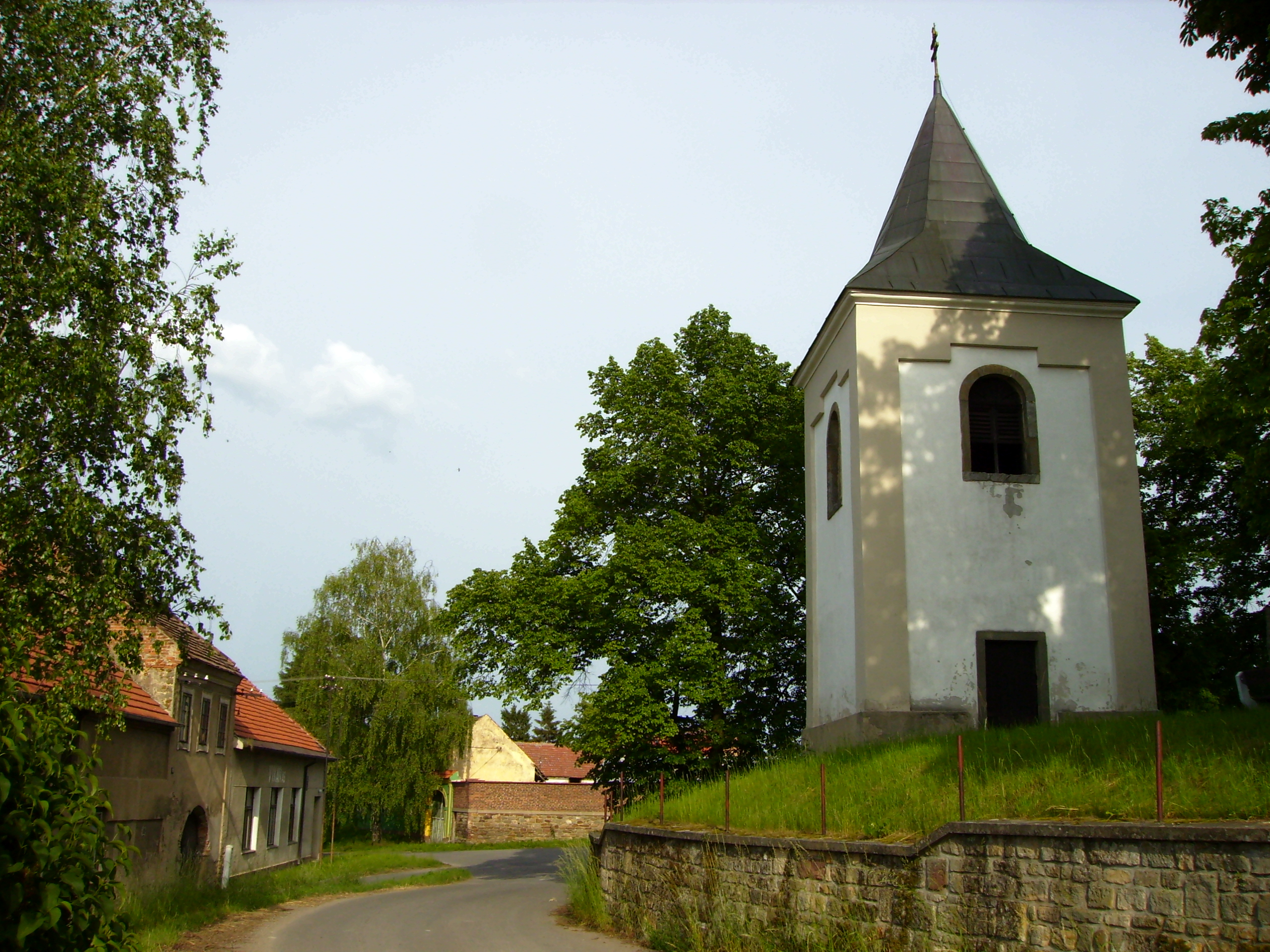 Zvonička ve Vykáni